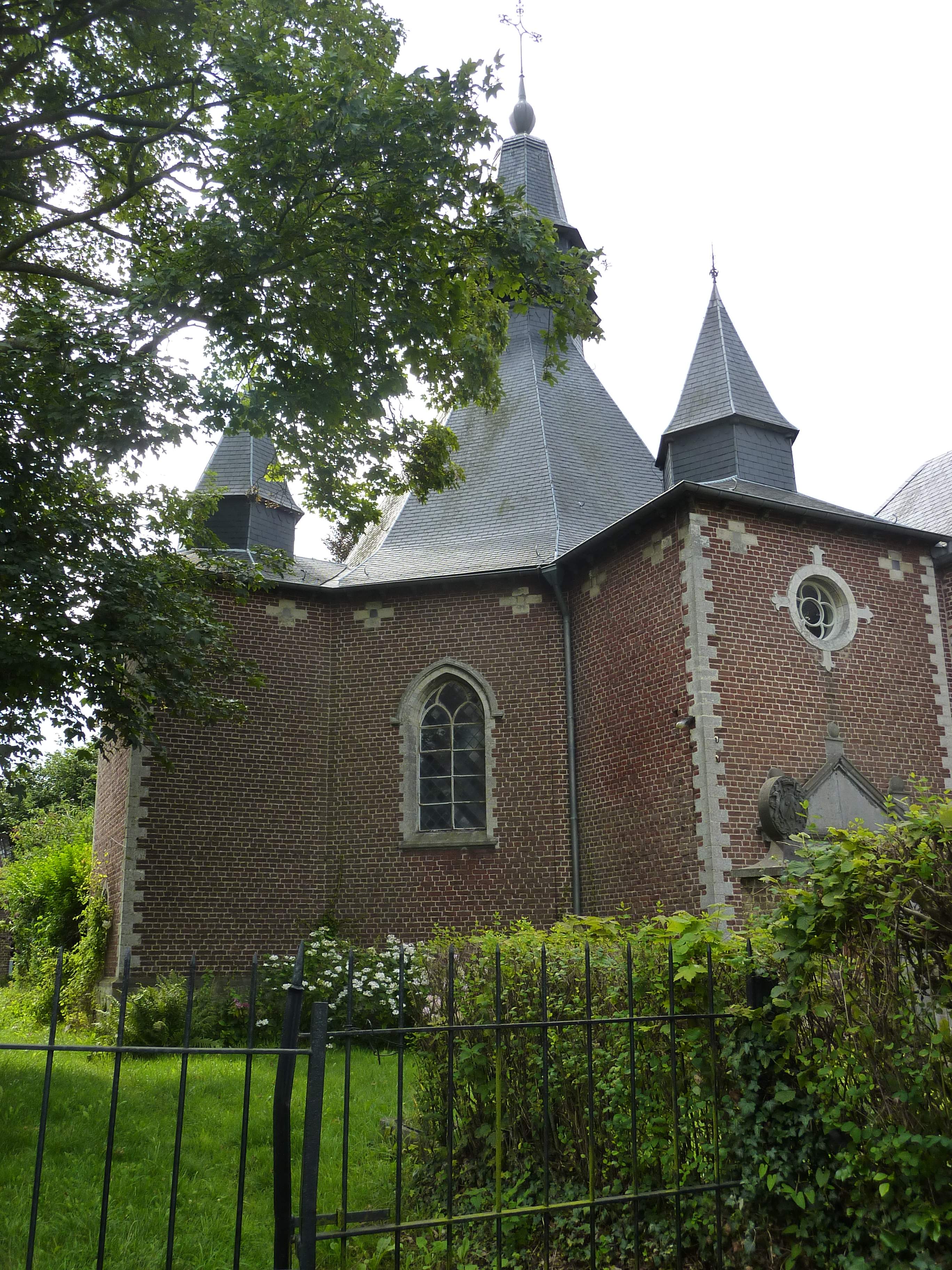 Chapelle Notre-Dame de Foy, Loupoigne, Belgique.